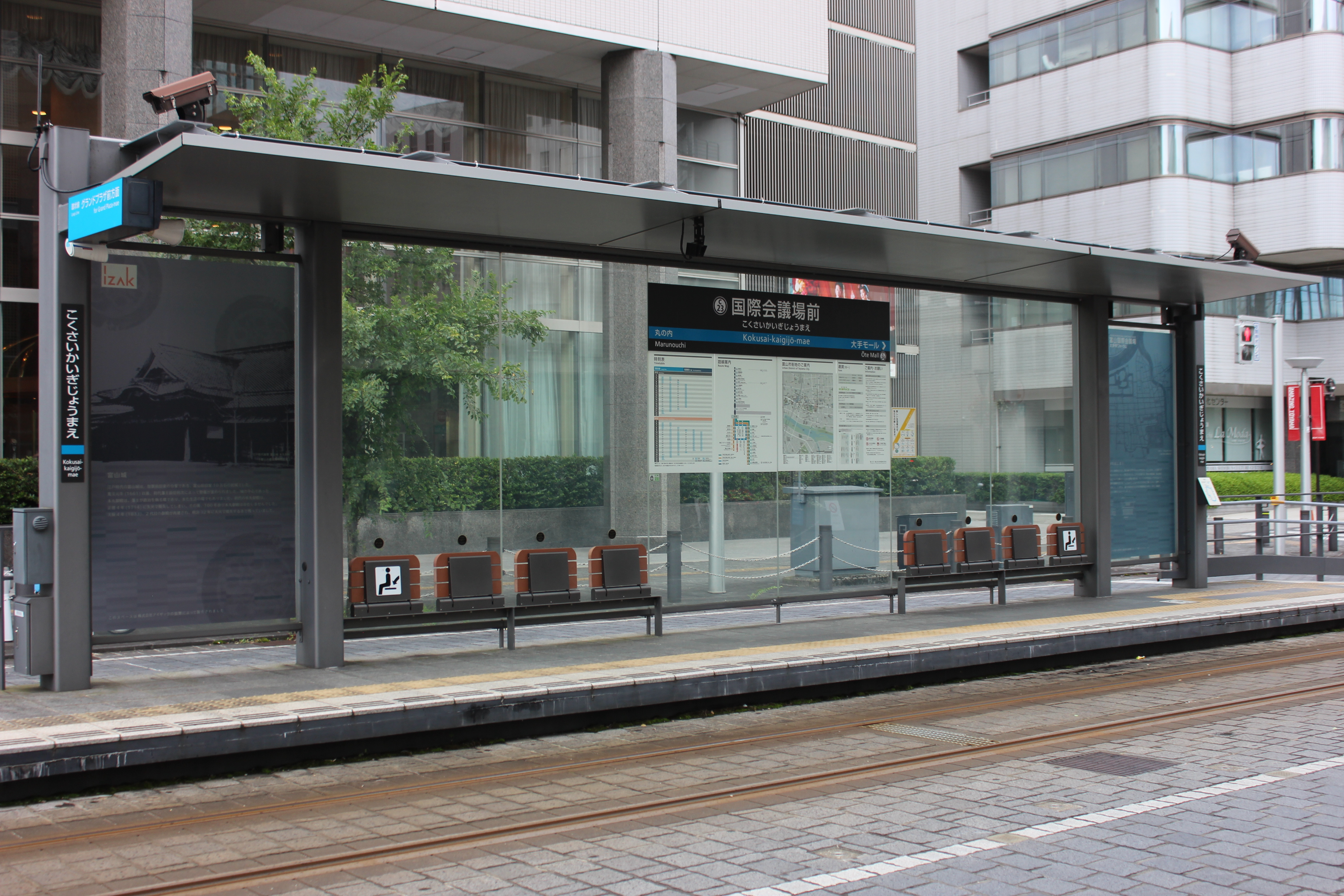 富山地方鉄道富山軌道線国際会議場前停留場